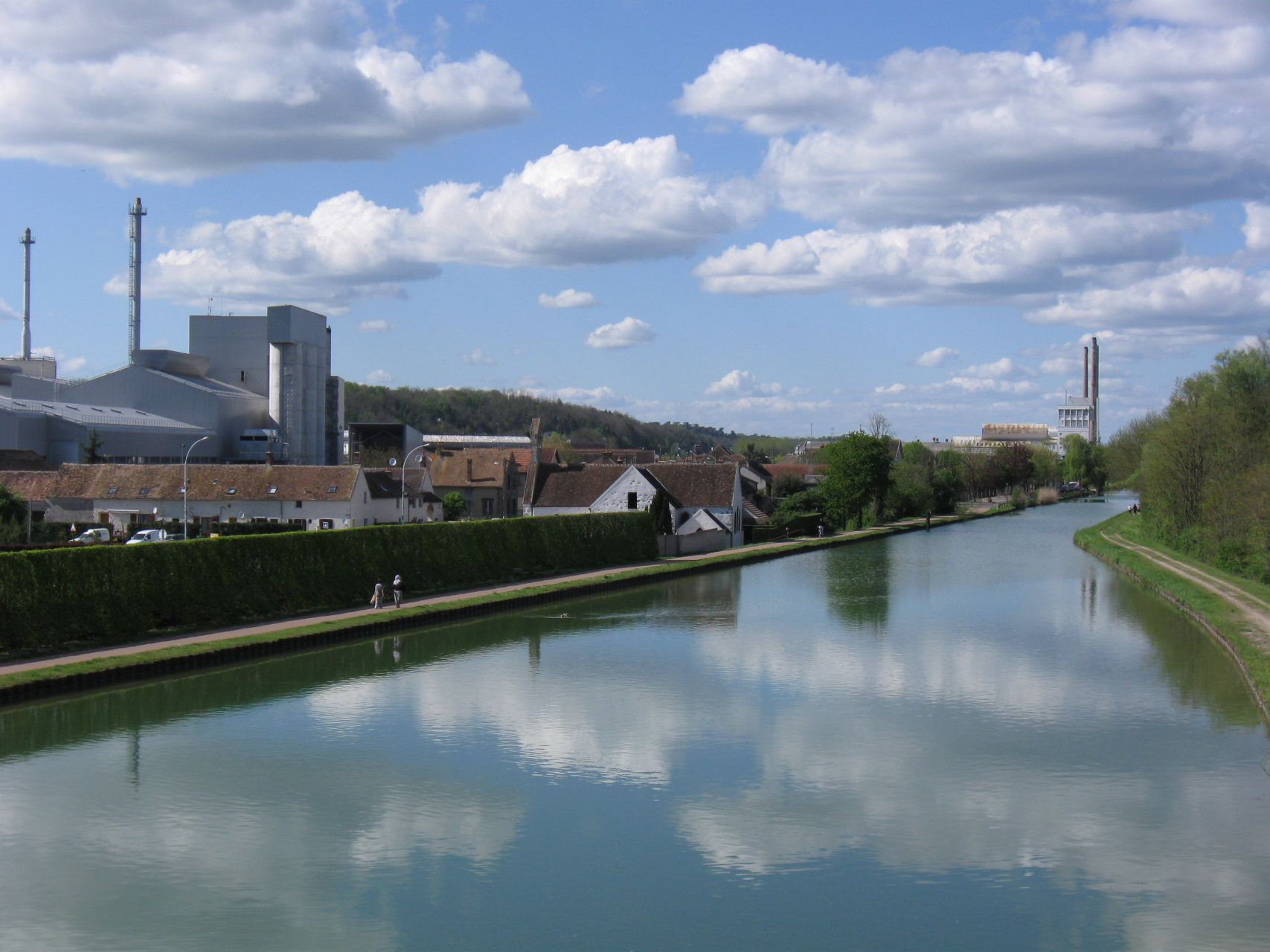 Le site industriel de Bagneaux-sur-Loing et le canal du Loing (Seine-et-Marne, région Île-de-France)